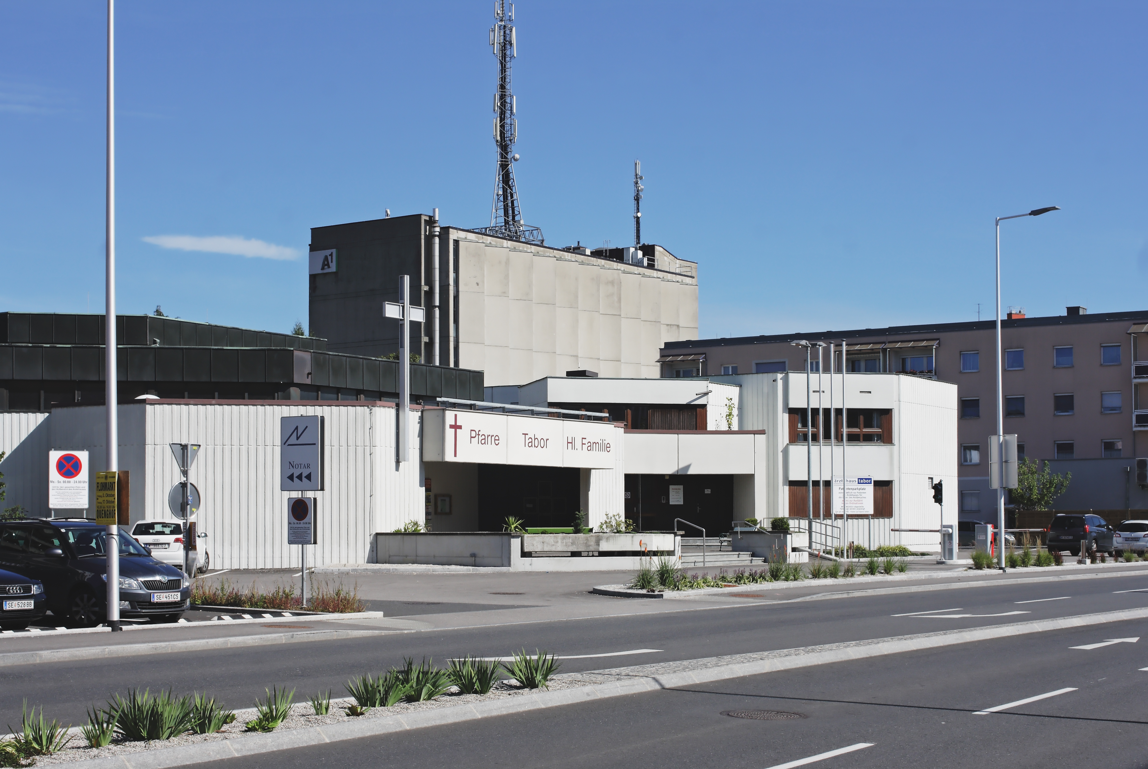 Die Pfarrkirche Steyr — Heilige Familie im Steyrer Stadtteil Tabor. Im Hintergrund ist das Gebäude der A1 Telekom Austria zu sehen.